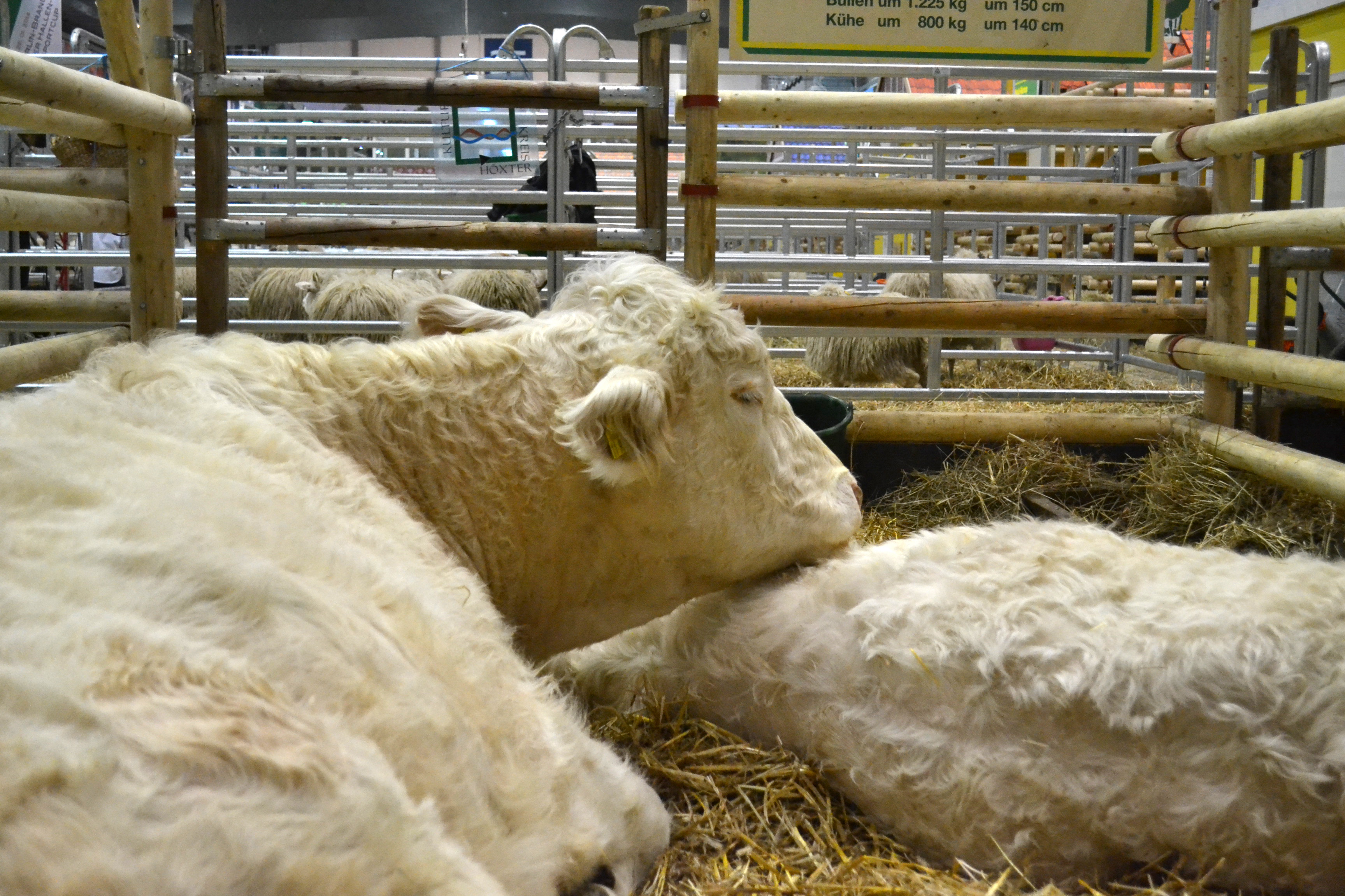 Rinderrasse Uckermärker, fotografiert auf der Grünen Woche 2014